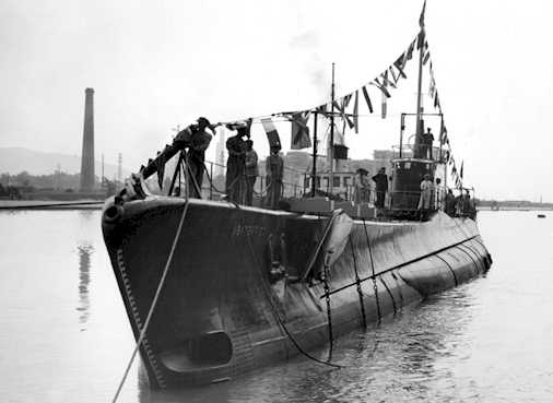 Sommergibile Barbarigo della Regia Marina Italiana